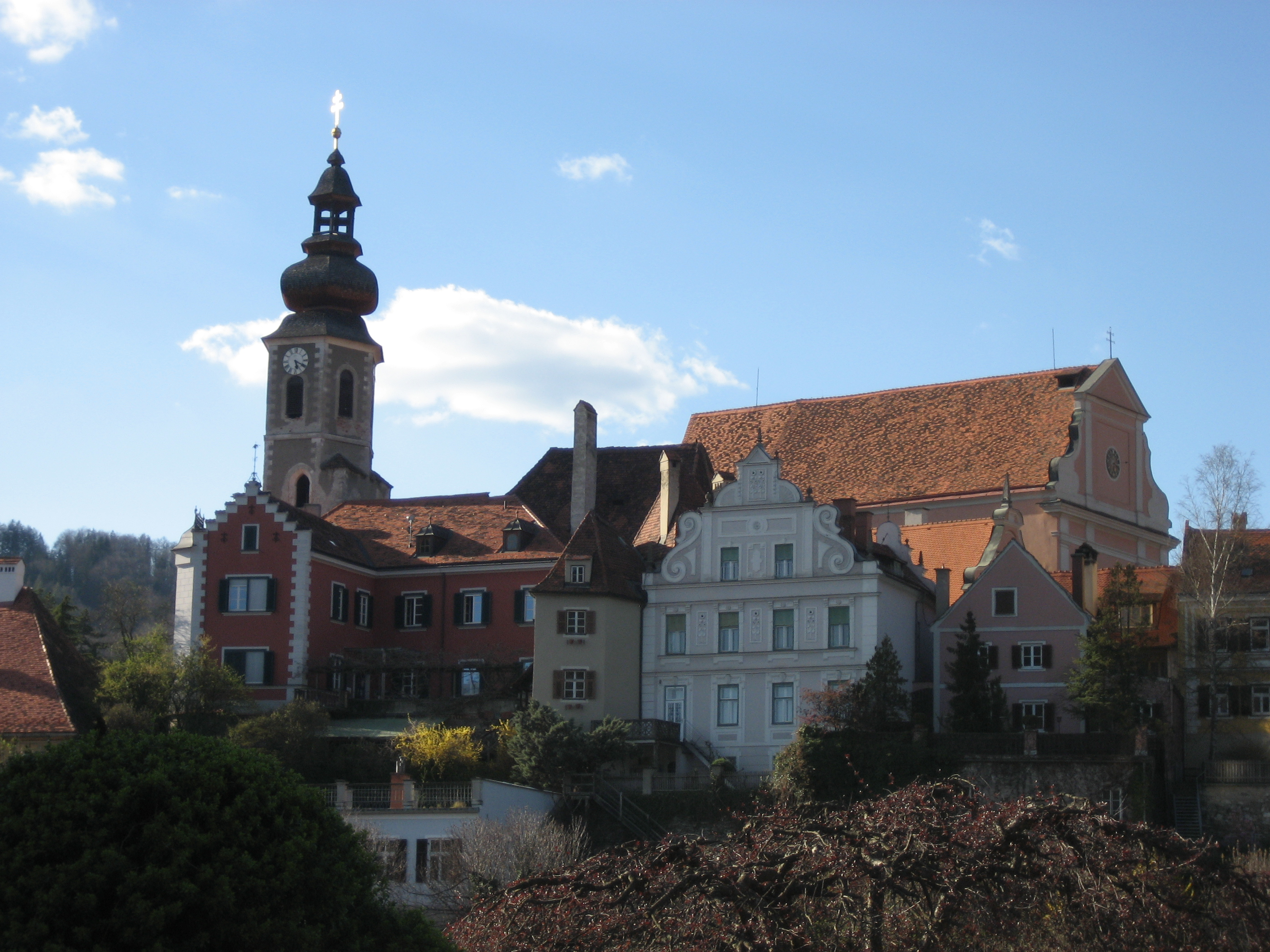 Frohnleiten in der Steiermark, Österreich, vom gegenüberliegenden Murufer aus gesehen (Frohnleiten, Syria, Austria)